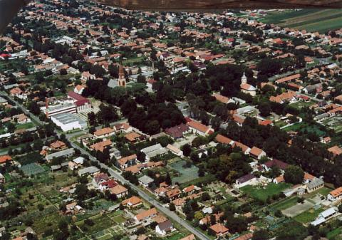 Kerekegyháza, Hungary, aerial photography